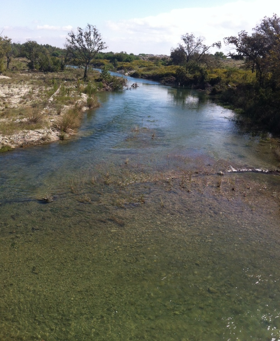 río san rodrigo